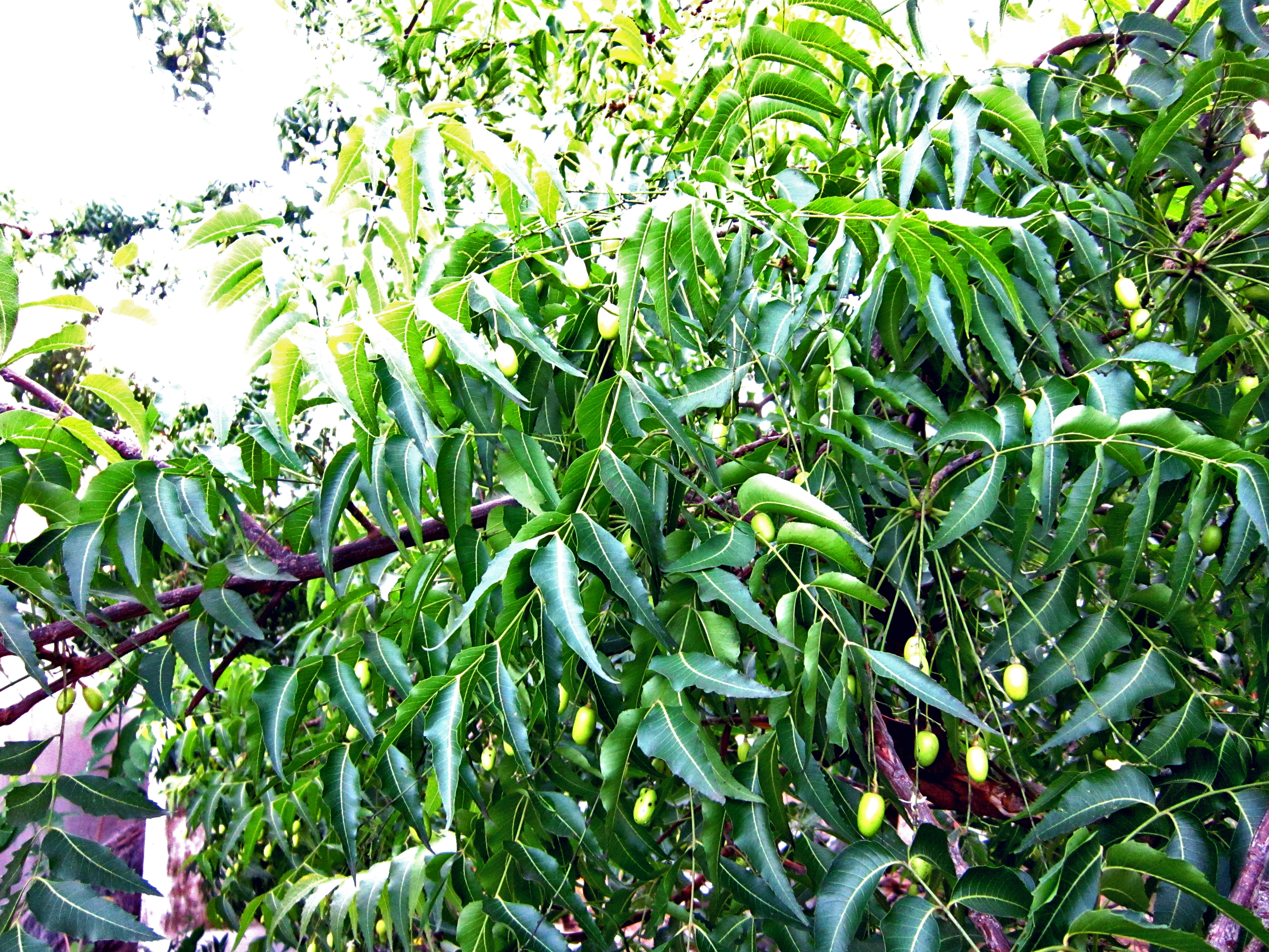 Quả xoan